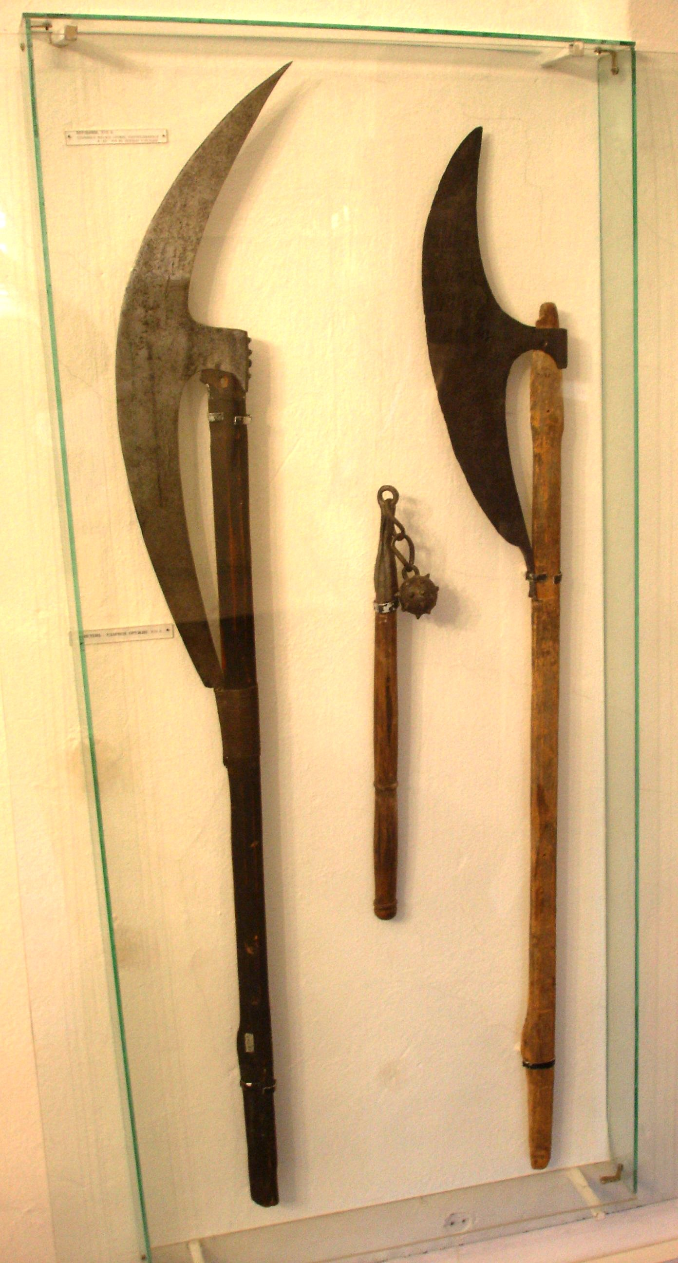 Bardiches in History Museum in Suzdal. Бердыши в Историческом музее Суздаля.